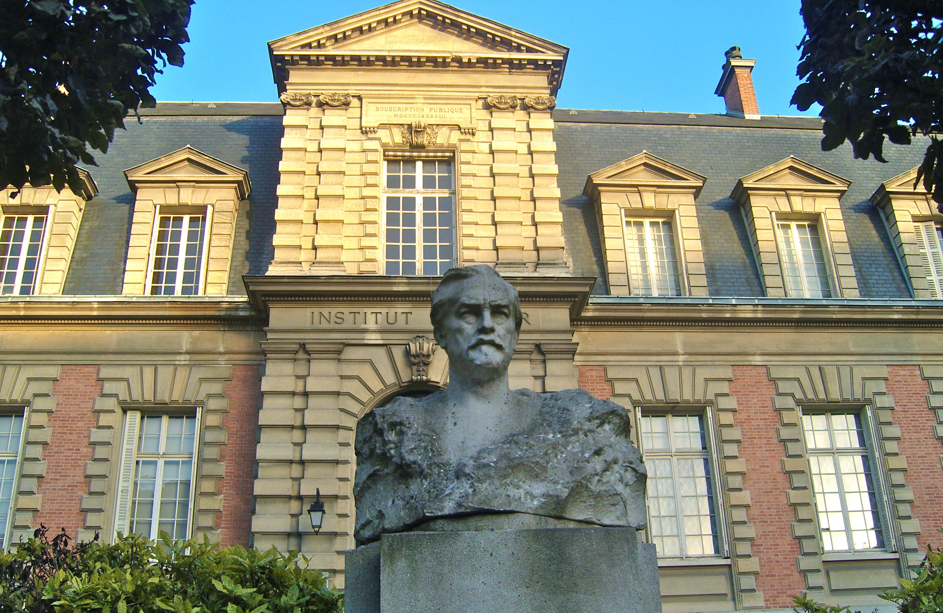 Institut Pasteur. Bâtiment abritant les anciens appartements et laboratoires de Louis Pasteur devenus un musée